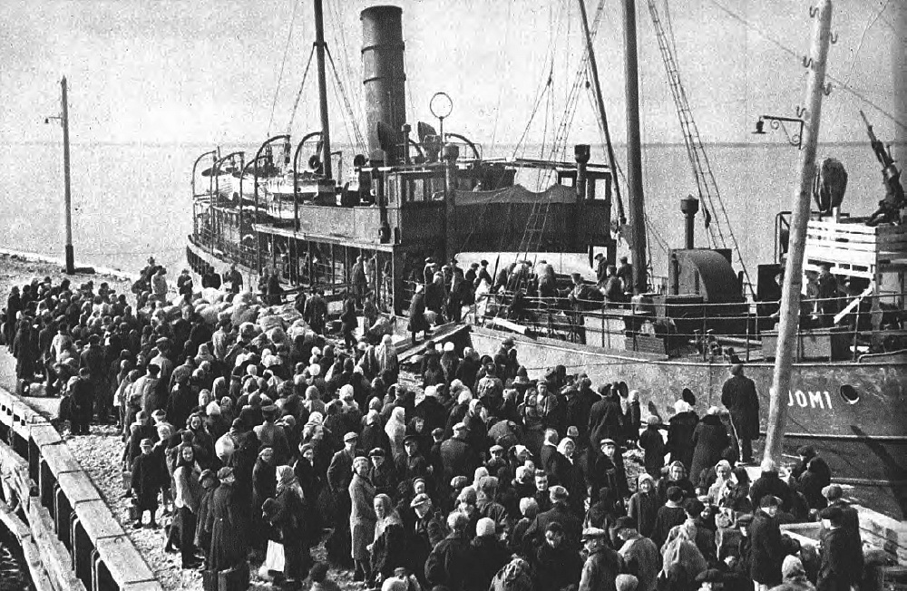 Теплоход «Суоми» в порту Палдиски. Перевозка ингерманладцев из концлагеря Клоога в Финляндию.